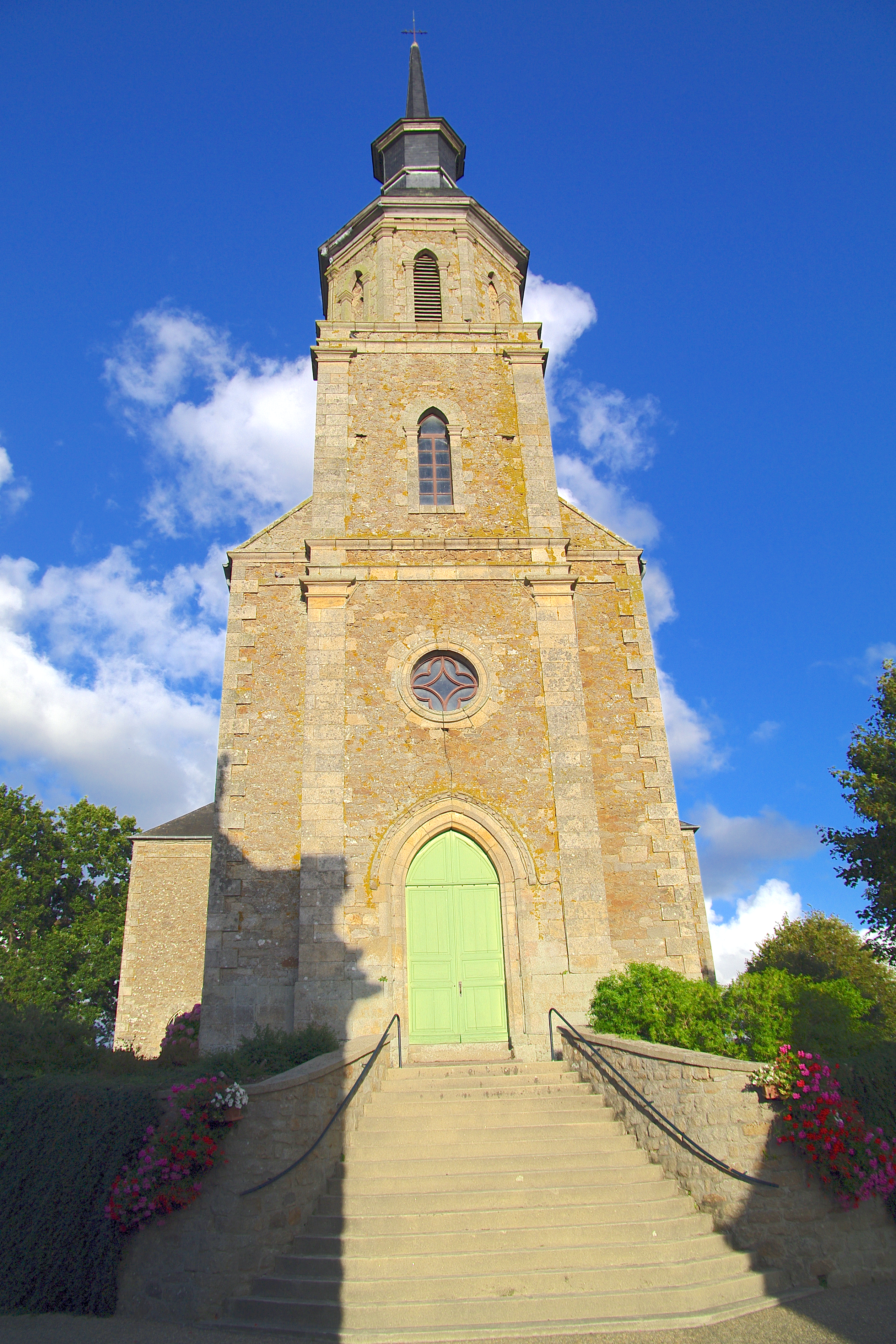 Église Saint-Nicodème, (Inscription, 1964) .